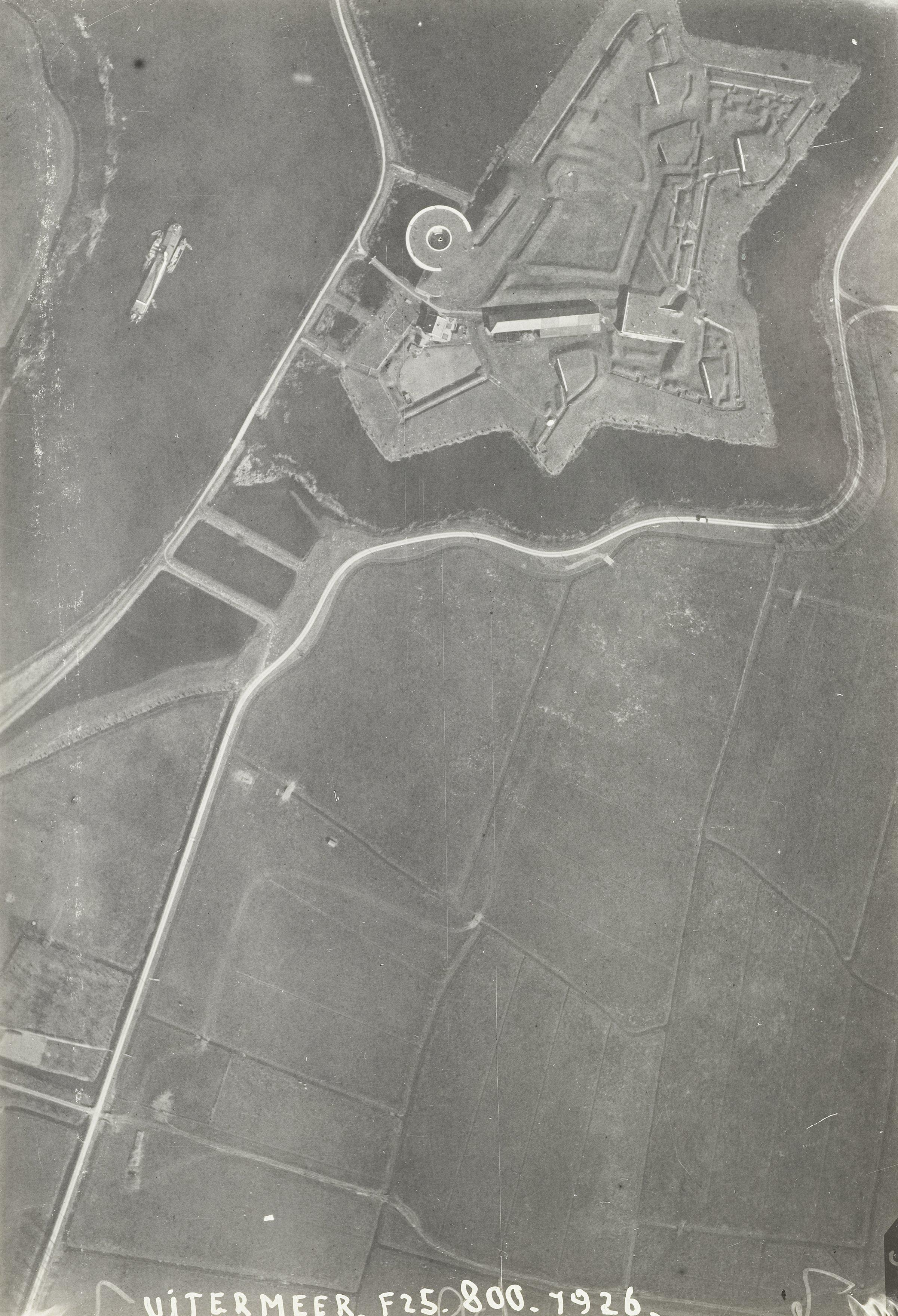 Luchtfoto van Fort Uitermeer vanaf 800 m hoogte.